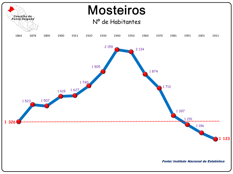 População